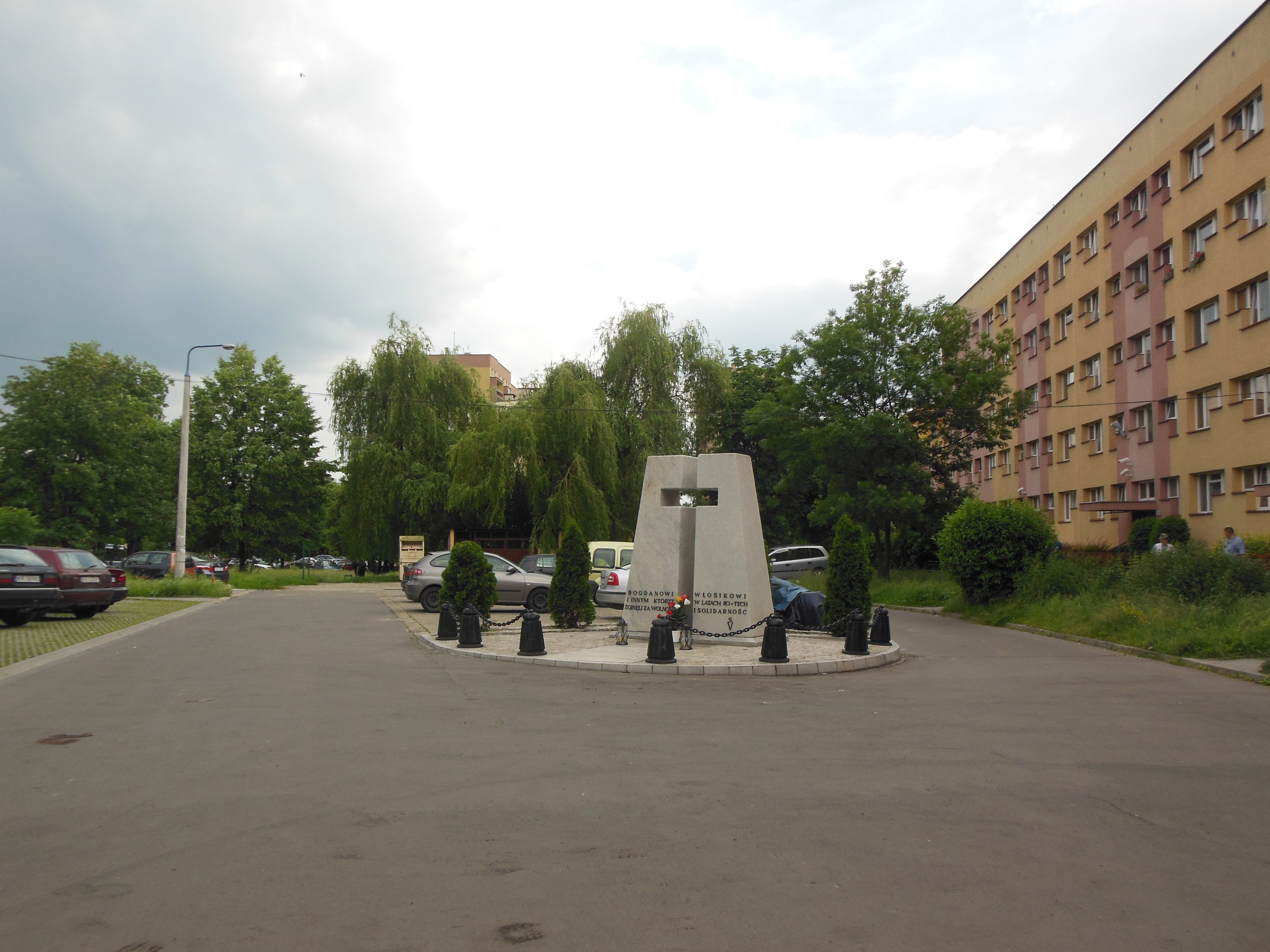 Plac Bogdana Włosika w Bieńczycach, Kraków.